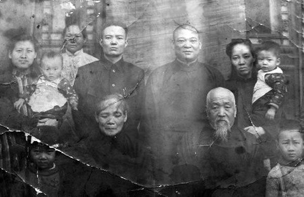 后排右为吴化文将军与妻子林士英，左为其弟吴化纲先生与妻子金品超。前排是其父母。